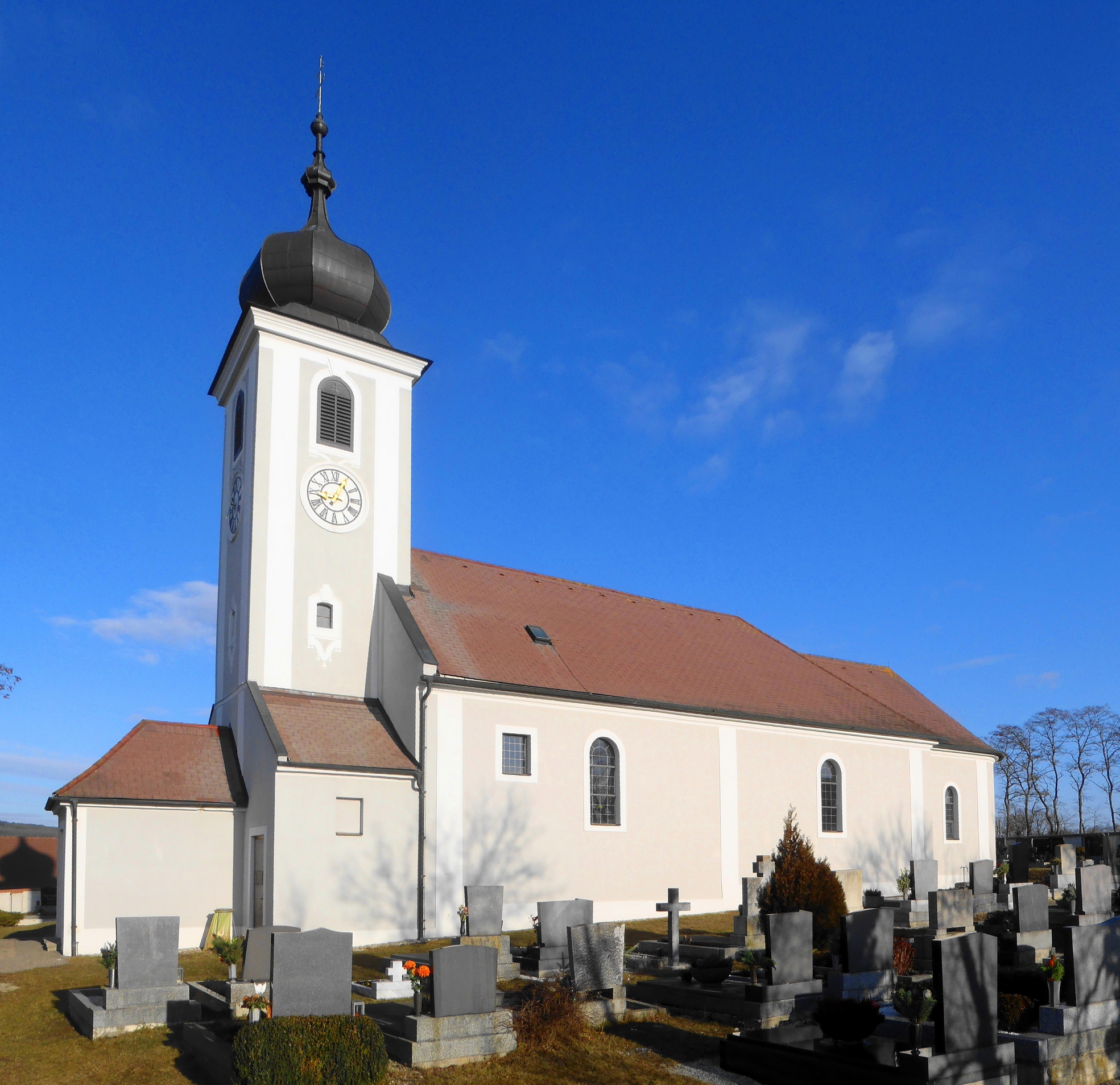 Kath. Pfarrkirche hl. Markus und Friedhof